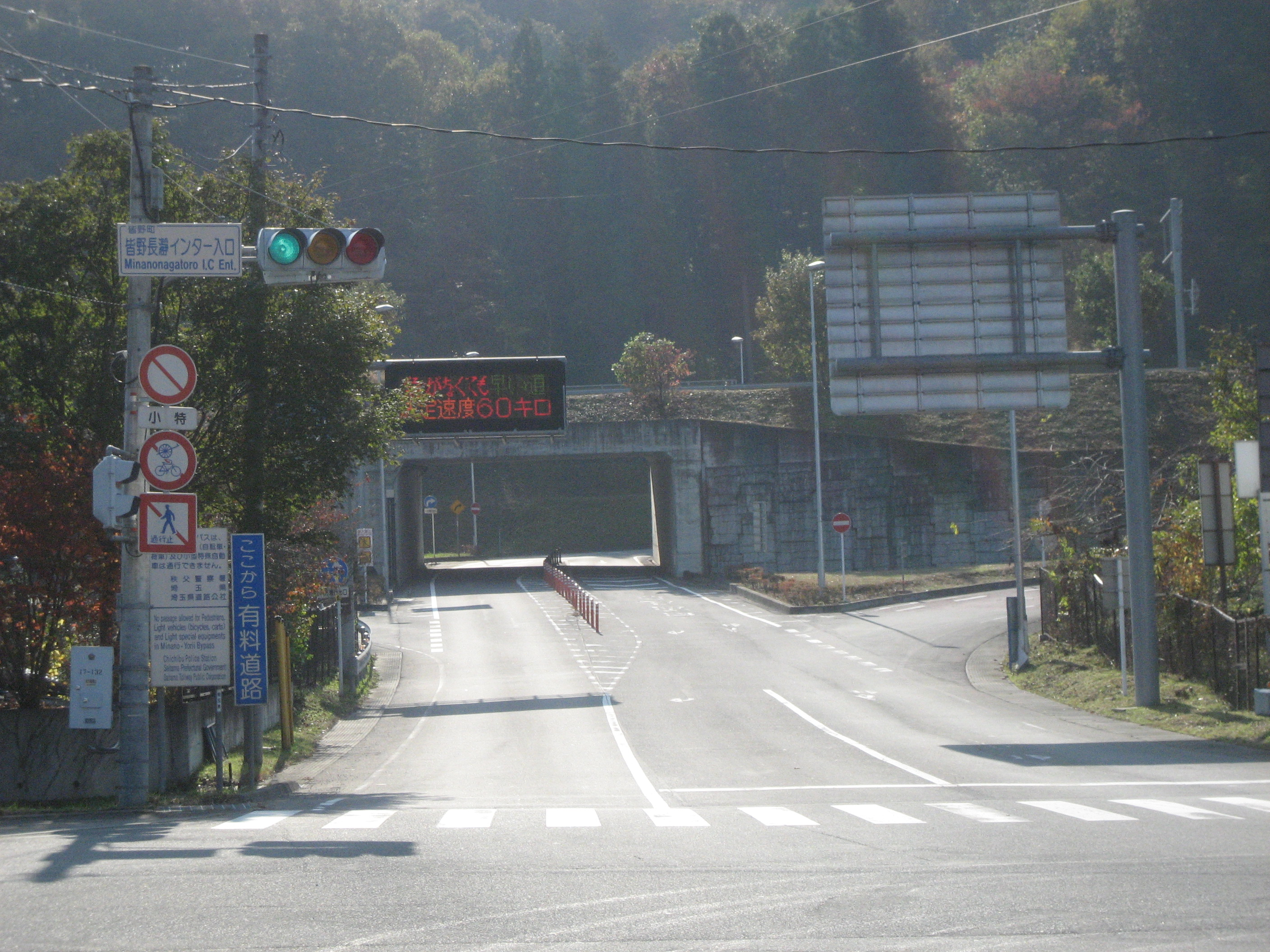 寄居皆野有料道路皆野長瀞IC出入口